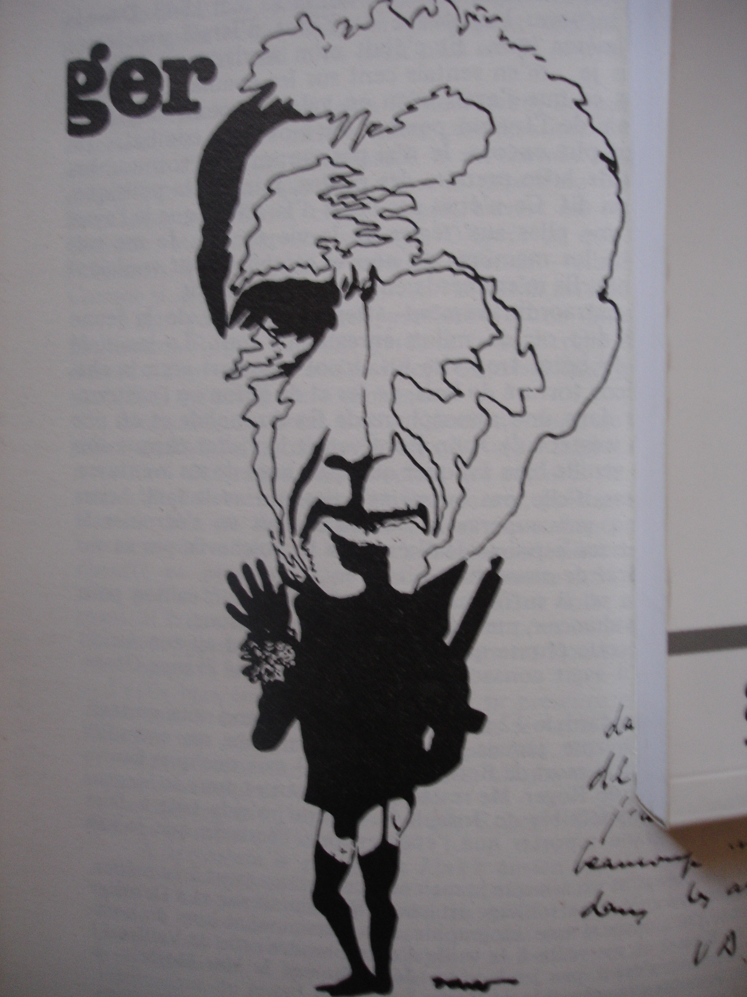 Caricature de l'écrivain Roger vailland